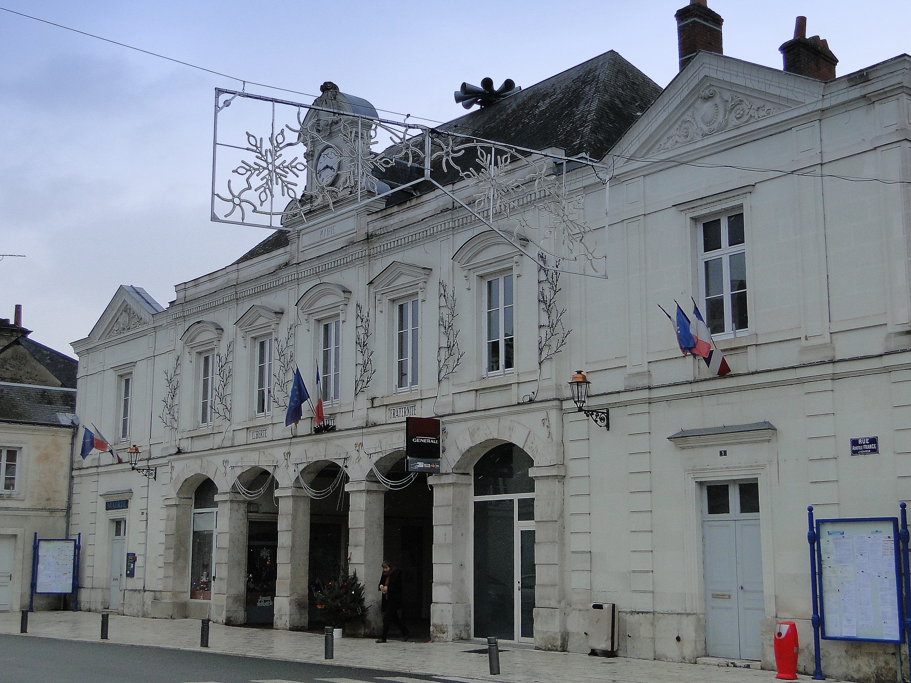 Mairie de Vernou-sur-Brenne (Indre-et-Loire)